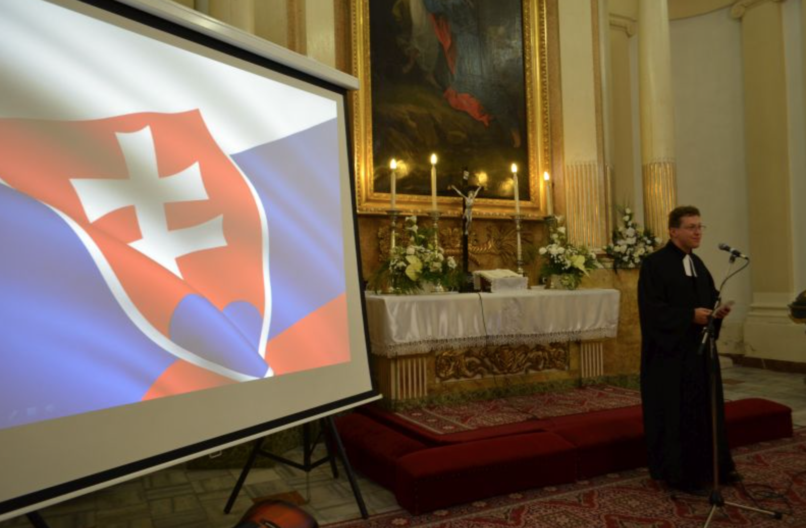 Fotka začiatku roka